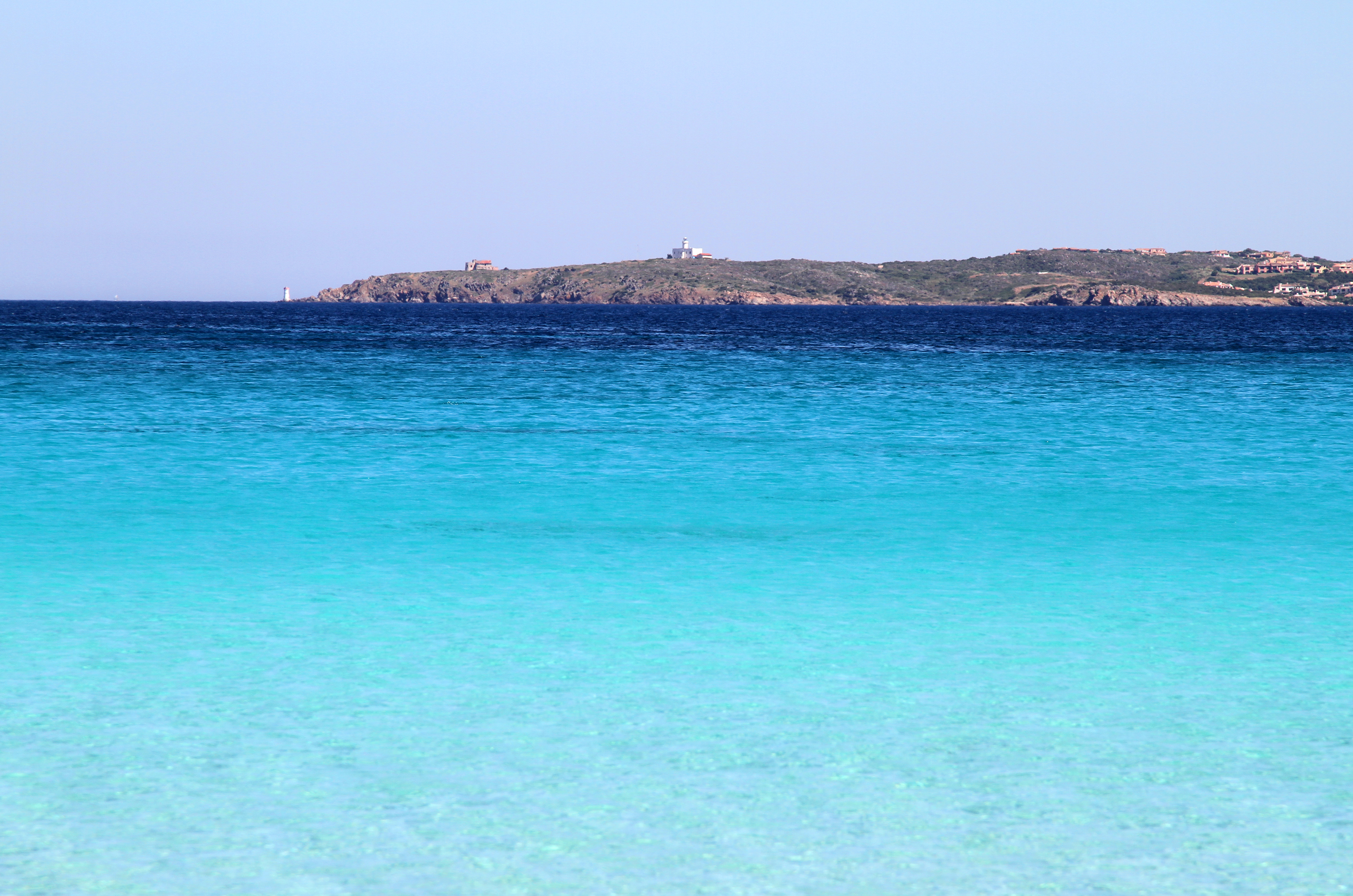 Il faro di Capo Ferro visto dalla spiaggia del Relitto (Caprera)